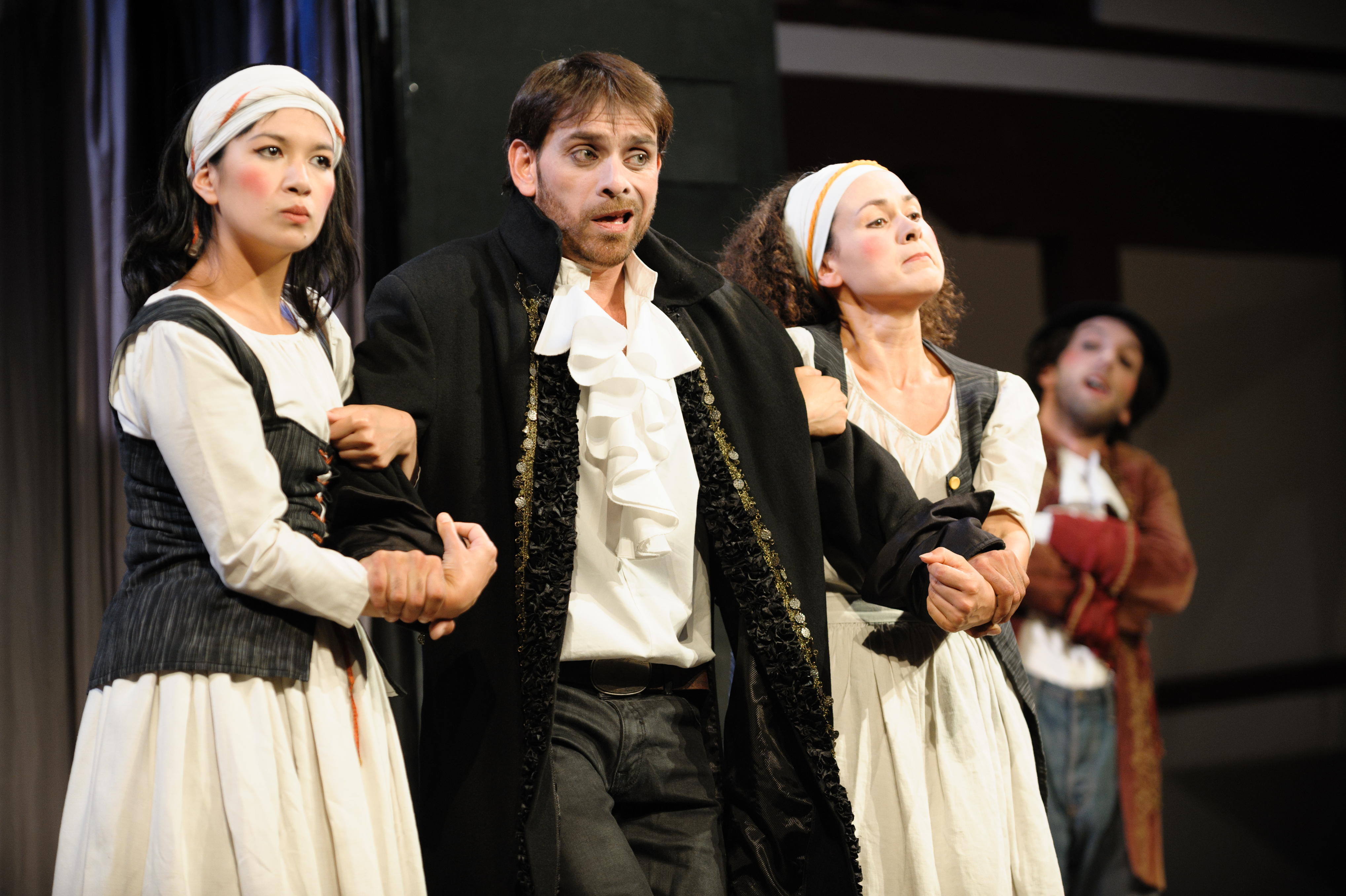 Don Juan Autor: Molière Dirección: Milena Vlach Cía: Compagnie Aigle de Sable (Francia) 29 julio 22.45h.